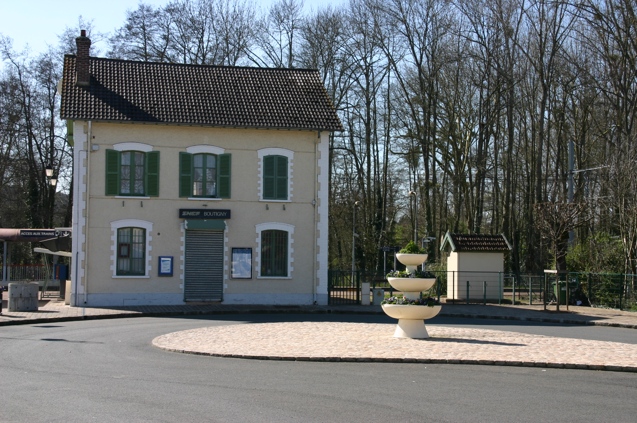 Gare de Boutigny, Boutigny-Sur-Essonne, département de l'Essonne (France)